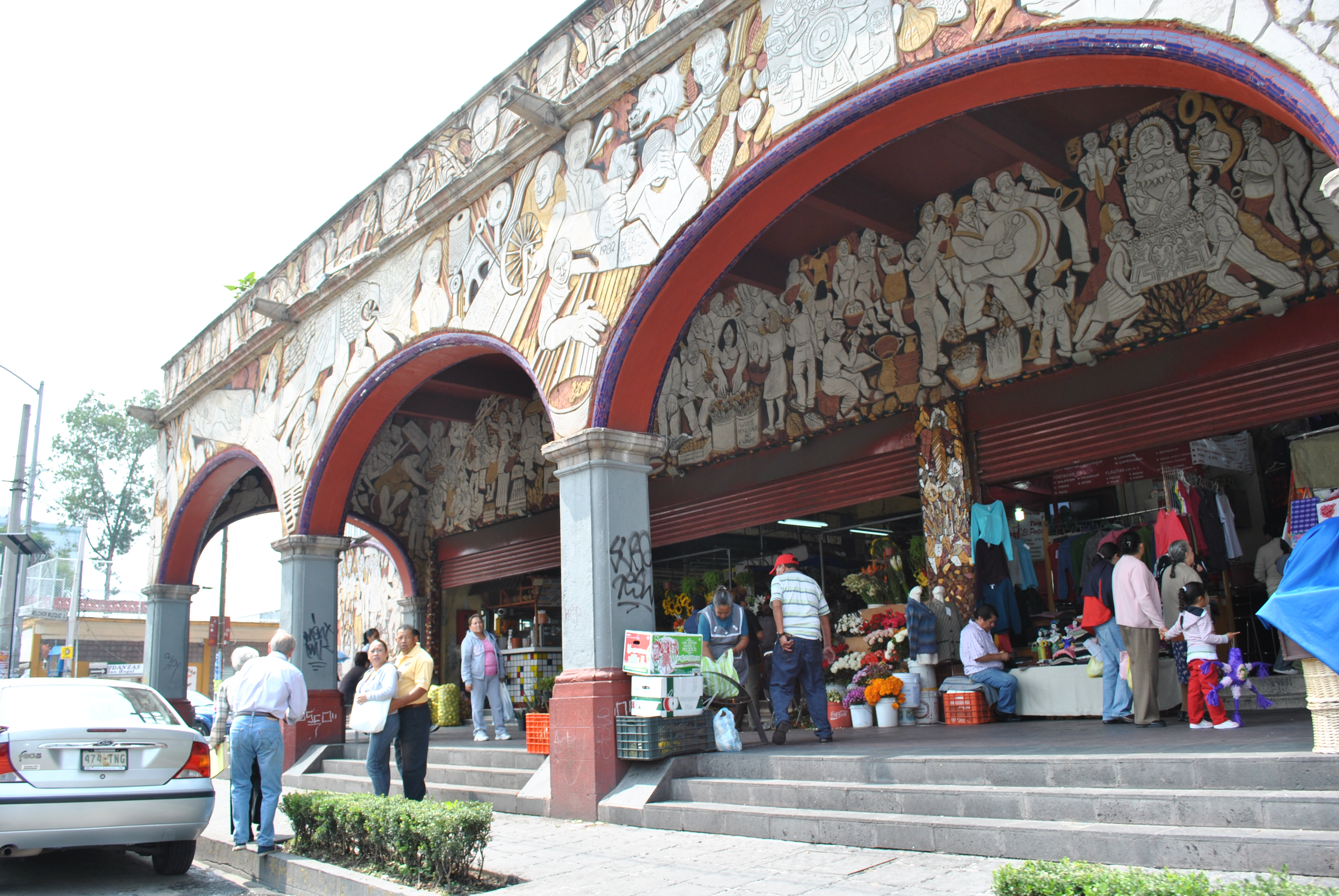 Mercado San Angel.